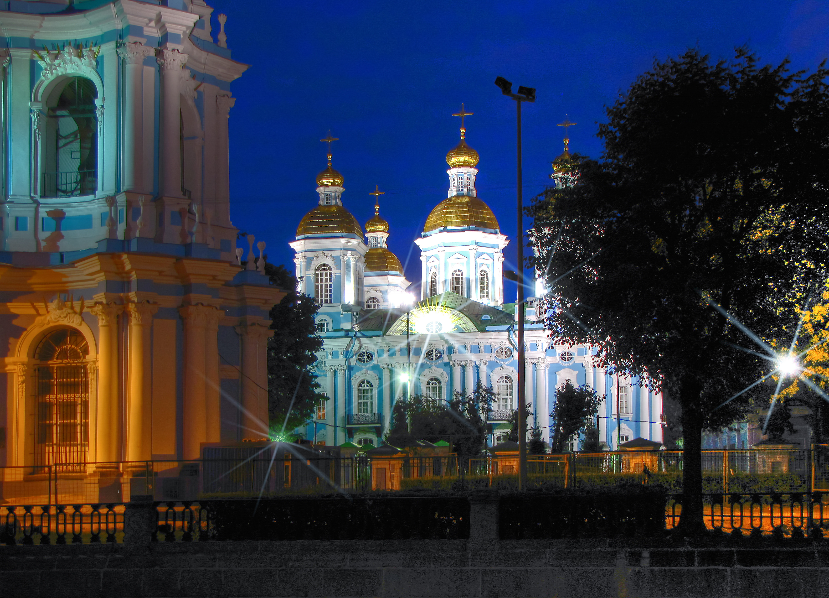 Санкт-Петербург. СОБОР НИКОЛО-БОГОЯВЛЕНСКИЙ (МОРСКОЙ)